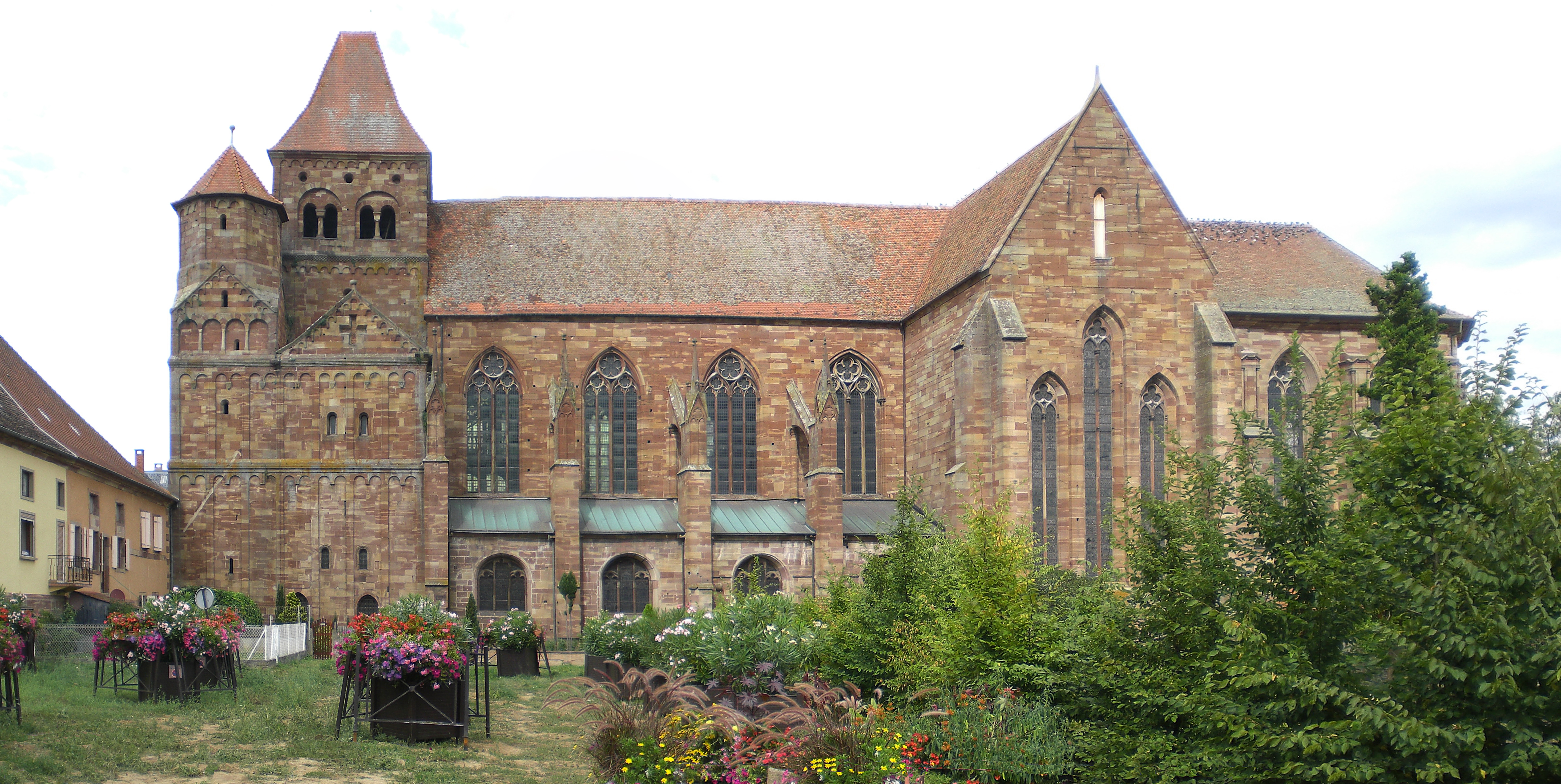 Abteikirche St-Etienne, Südseite. Marmoutier, Niederelsass. Sicht von der Rue du Convent.